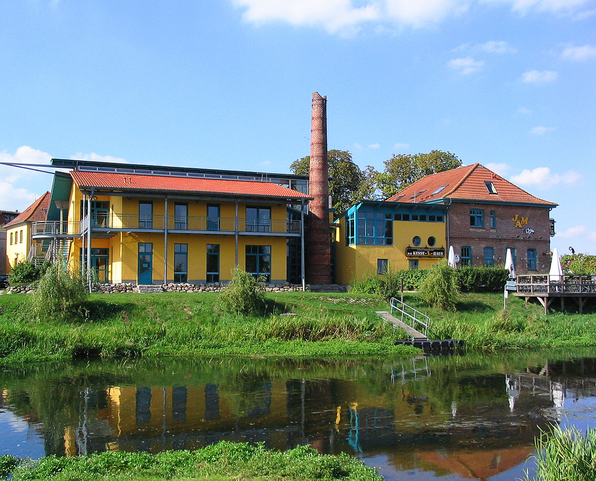 Jugendhaus Alte Molkerei - JAM - in Bad Sülze, im Vordergrund die Recknitz